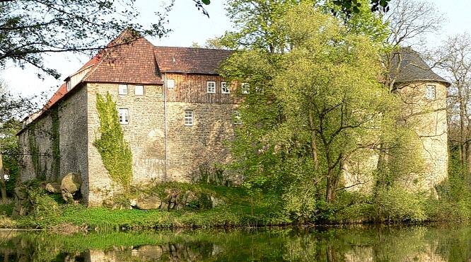 Rückseite von Burg Neuhaus mit Burgteich